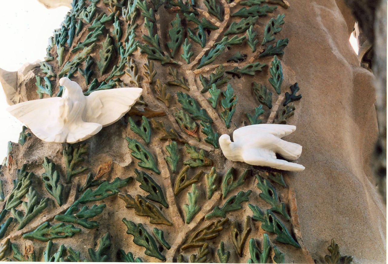 Sagrada Familia, Barcelona, Spain